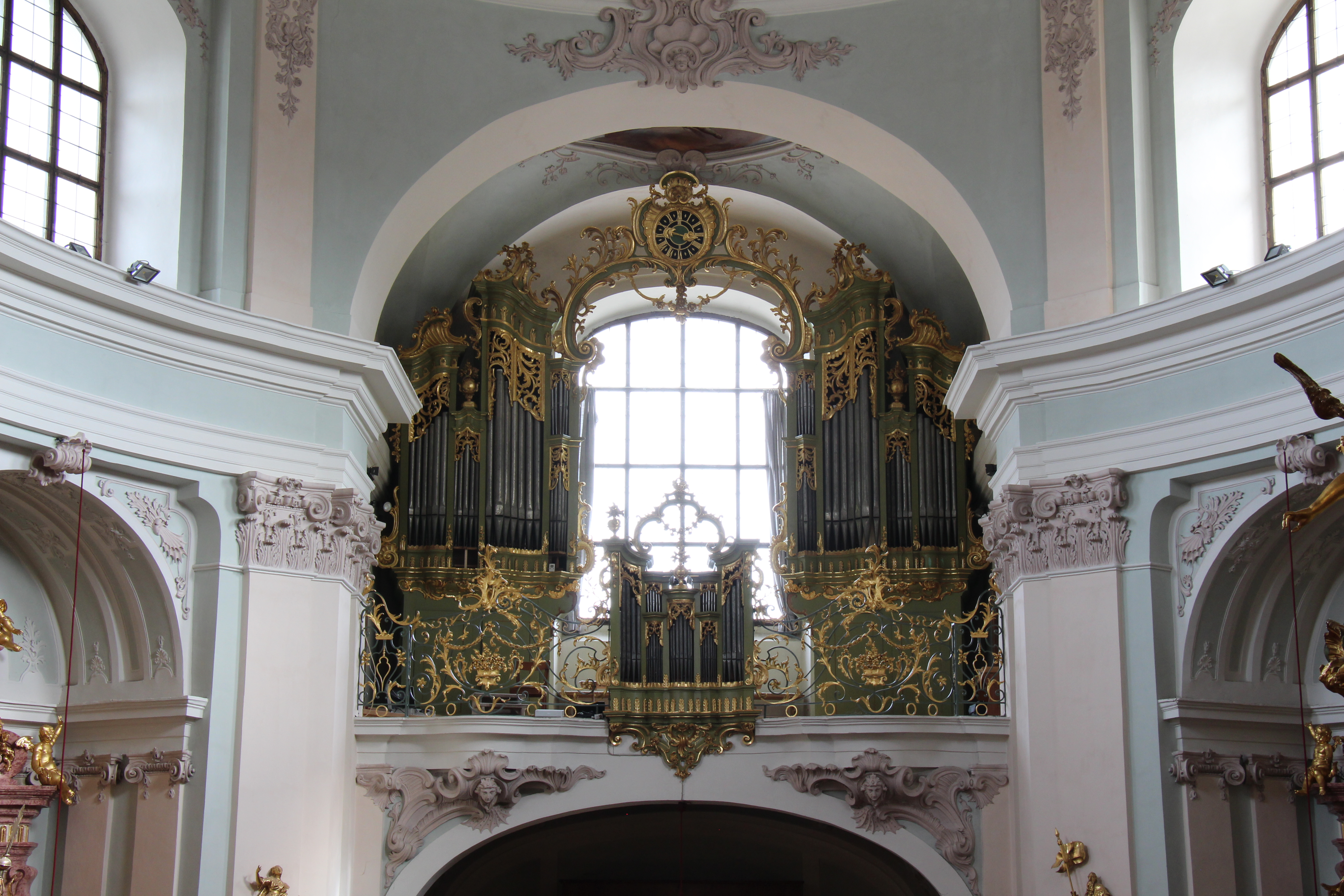 Orgel von Anton Pfliegler für Hafnerberg 1767, von Hencke begonnen